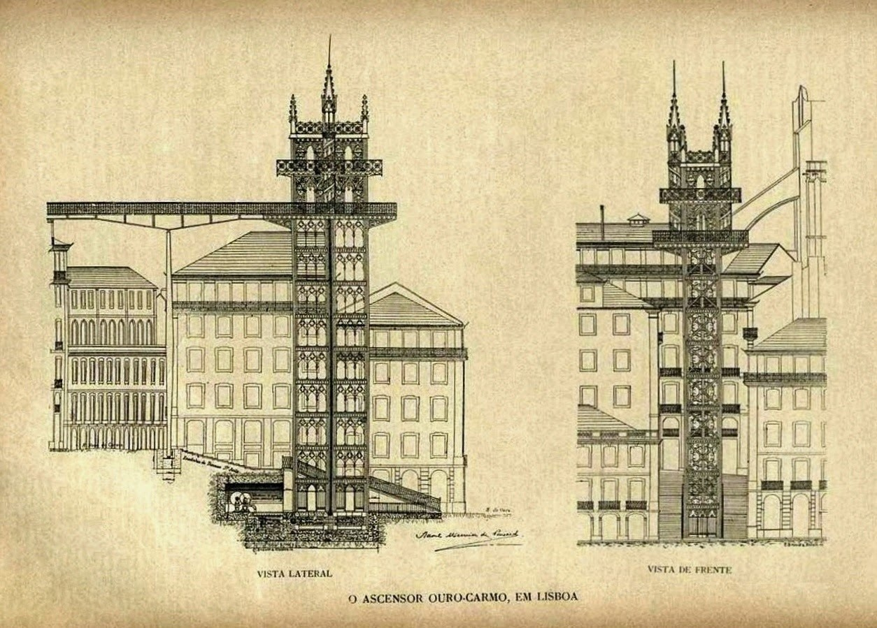 Funiculares de Lisboa.